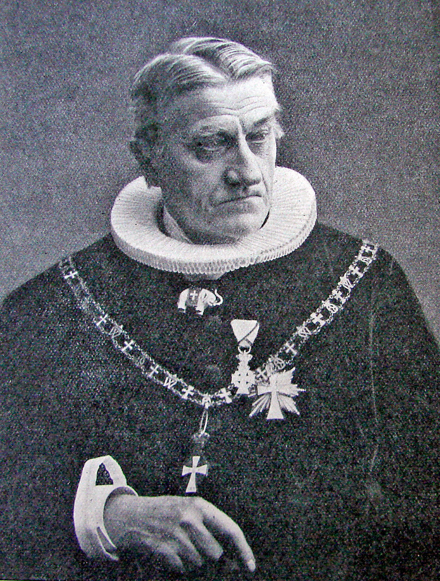 Thomas Skat Rørdam 11. februar 1832 - 25. september 1909, biskop over Sjælland fra 1895 til sin død.